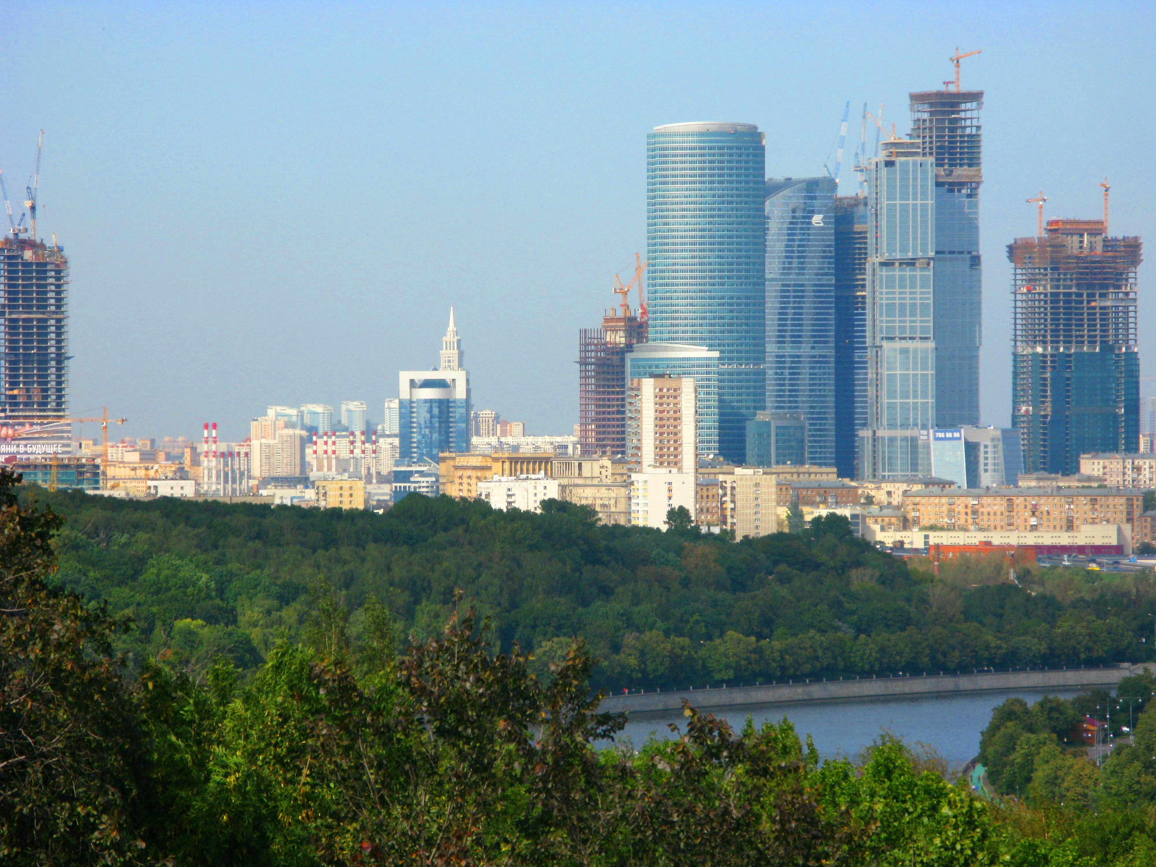 Вид Москвы с Воробьёвых гор. Moscow. Russia.